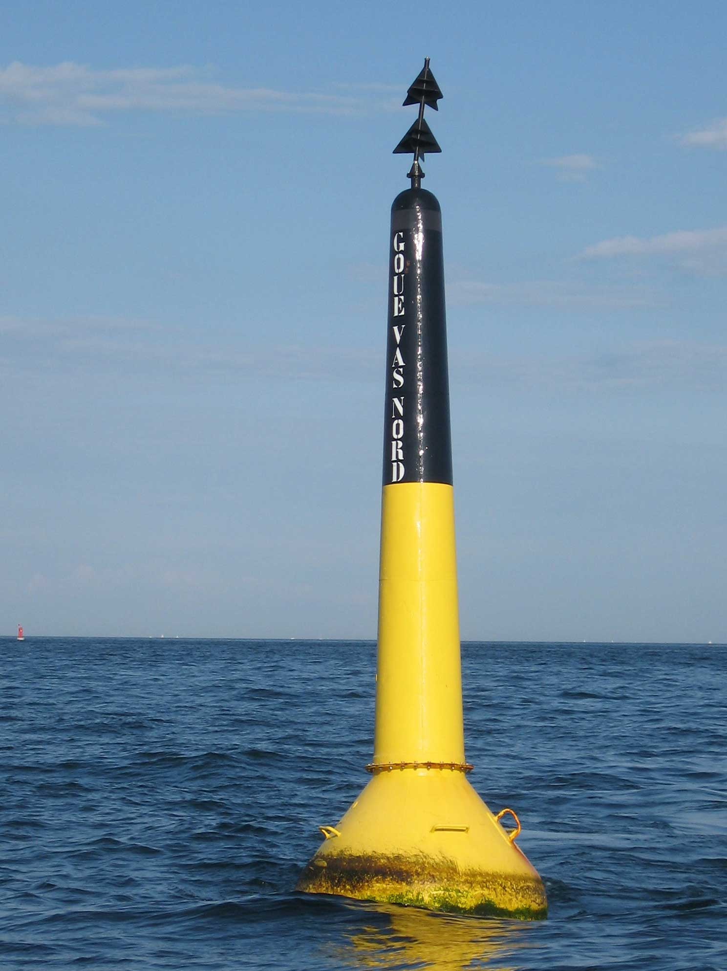 Description : Balise Cardinale Nord Place : Lorient, Bretagne, France Date : 2006 Auteur : Pline